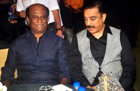 Rajinikanth and Kamal Haasan at audio release of Shamitabh